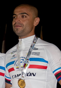 Campeonato Panamericano de Ciclismo de Pista, Medellín. 5 de mayo de 2011